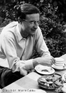 Dalibor Mareček (1915-1945), český malíř a hudebník